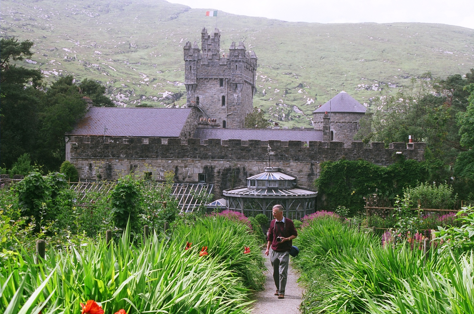 Het kasteel en de tuinen van kasteel Gleveagh in Ierland in het gelijknamige park